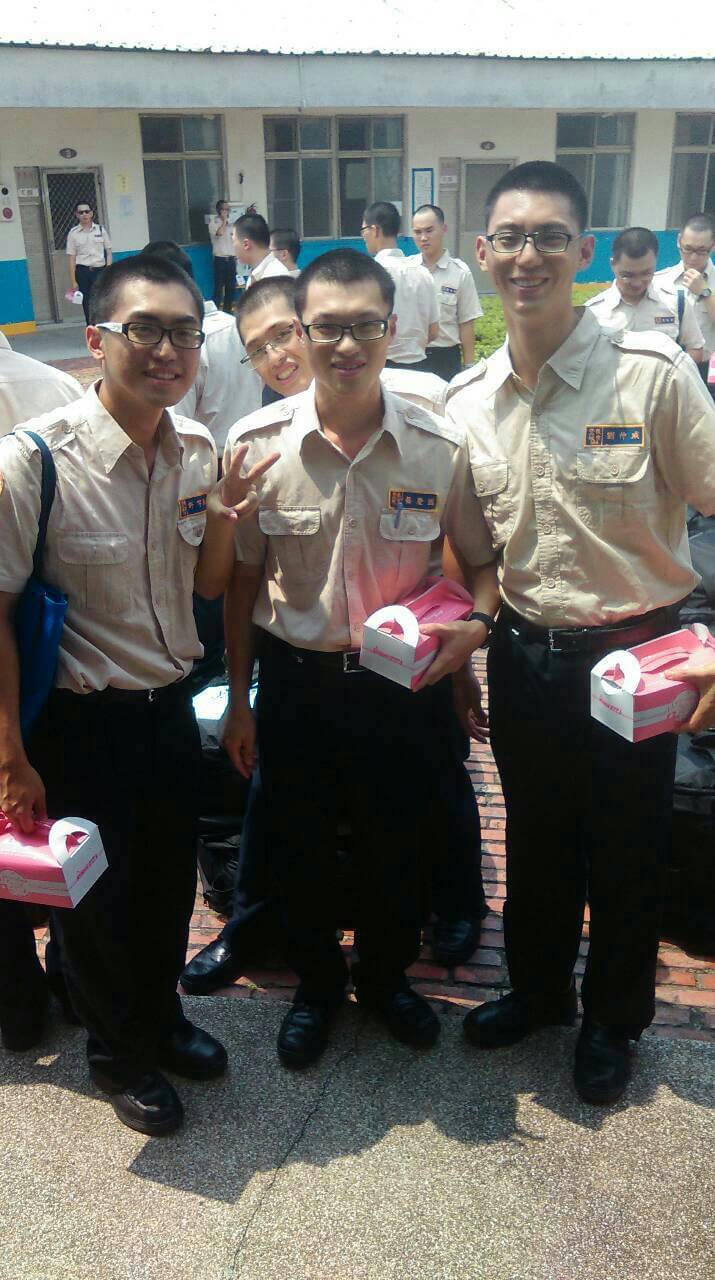 2015年臺灣的替代役役男們